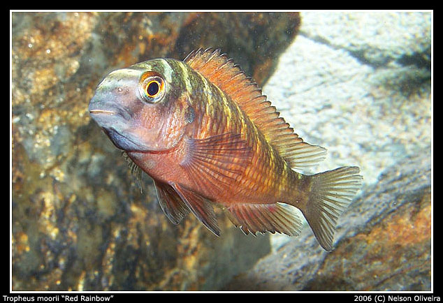 Tropheus Moorii "Red Rainbo" (Kasanga)